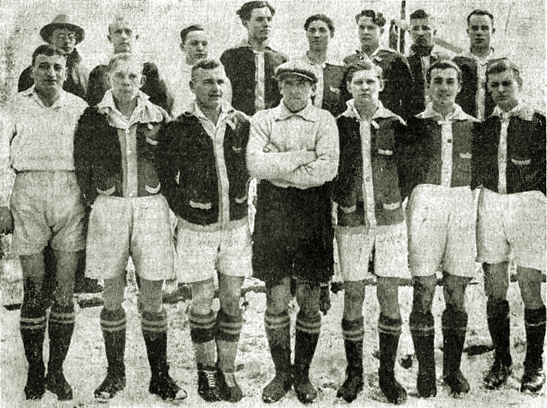 Der oberschlesische Bezirksmeister VfB Gleiwitz OBERE REIHE VON LINKS: Vereinsführer Janetzko, Juretzki, Soika, Hilla, Krzymek 2, Mayerhofer, Wroczyna, Pisulla, UNTERE REIHE VON LINKS: Kindler, Jonda, Grollik, Ritzka, Wybranietz, Krzymek 1, Schaletzki